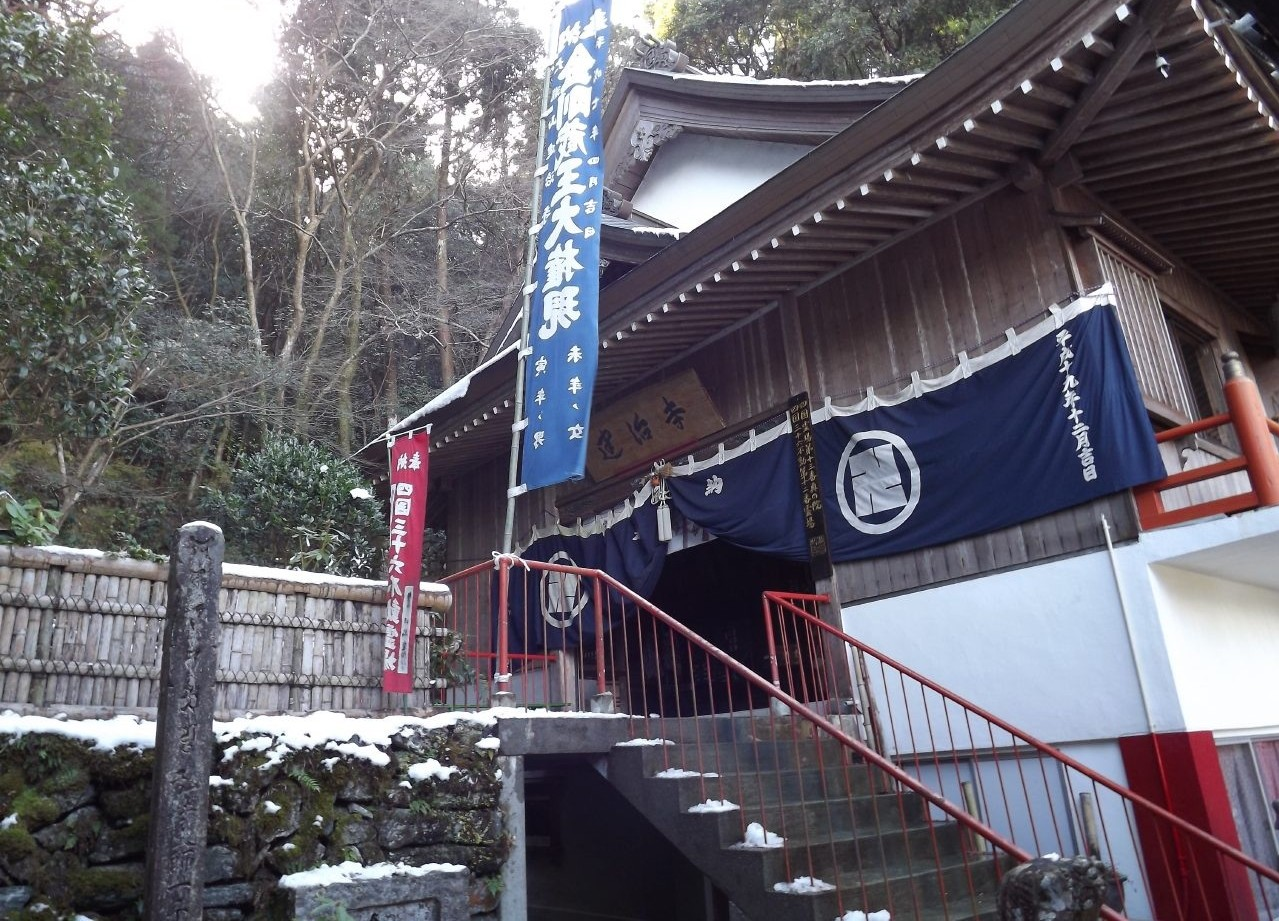 建治寺の本堂